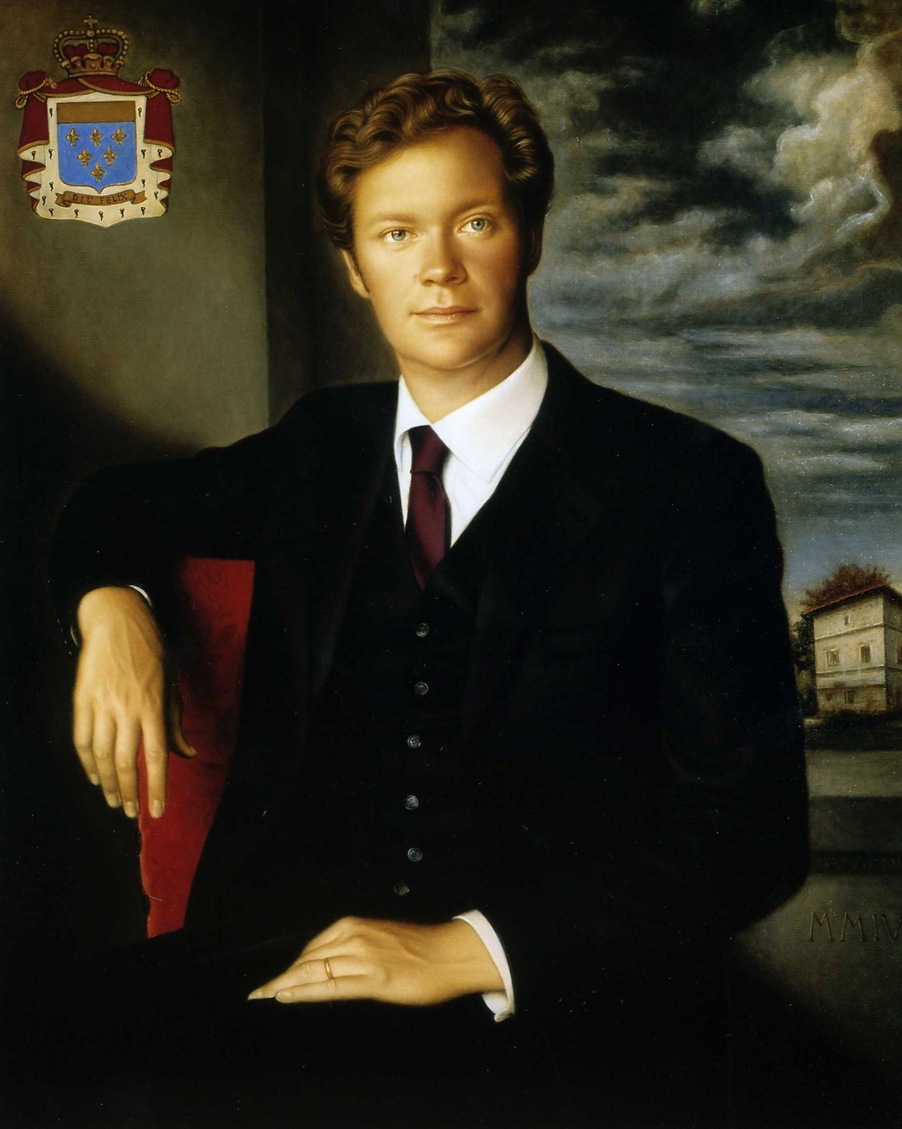 Il quadro del pittore Ulisse Sartini, rappresenta Guecello Uguccione, XIX° Principe di Porcia e Brugnera, nato nel 1971.